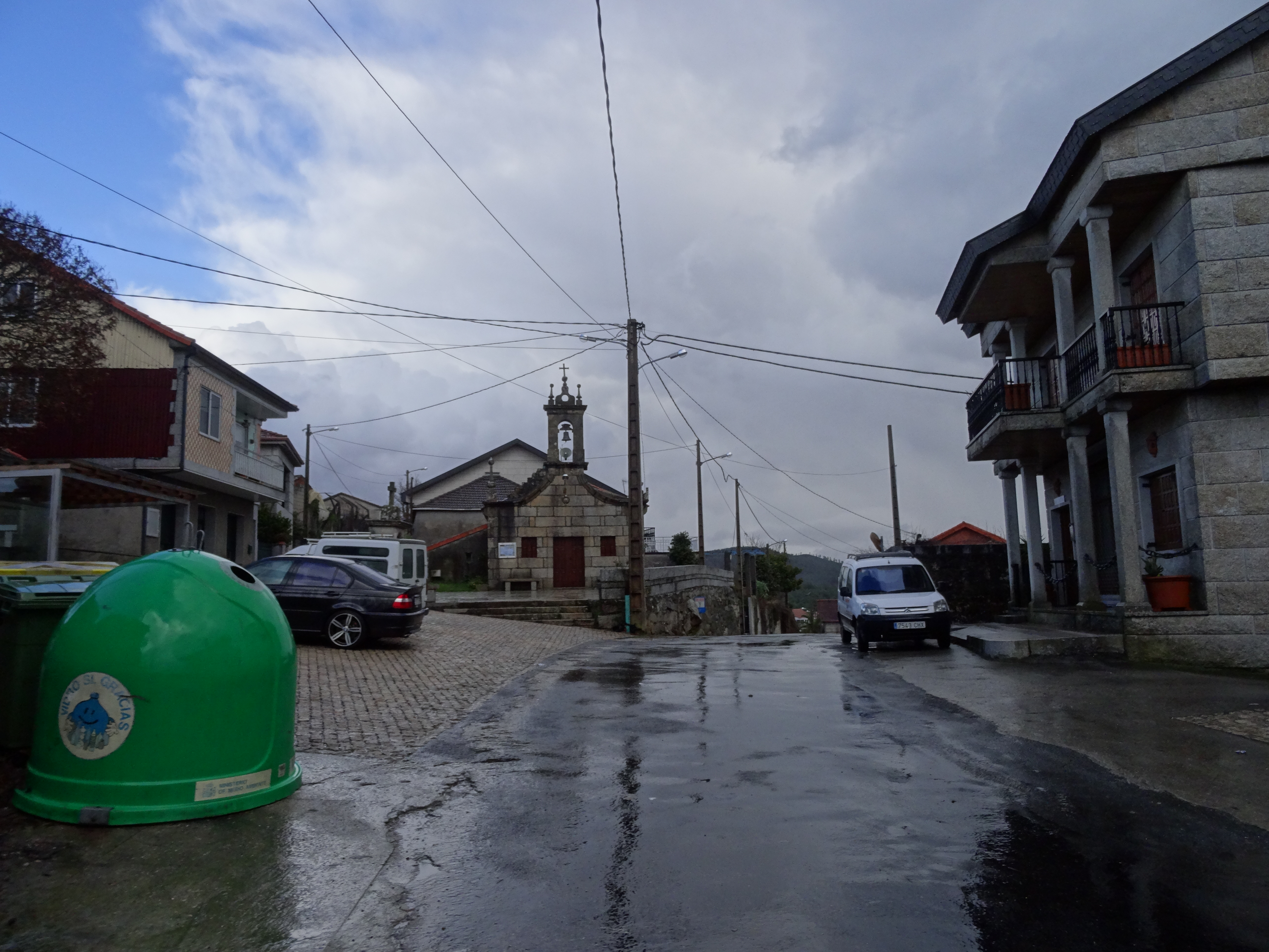 Ver título.